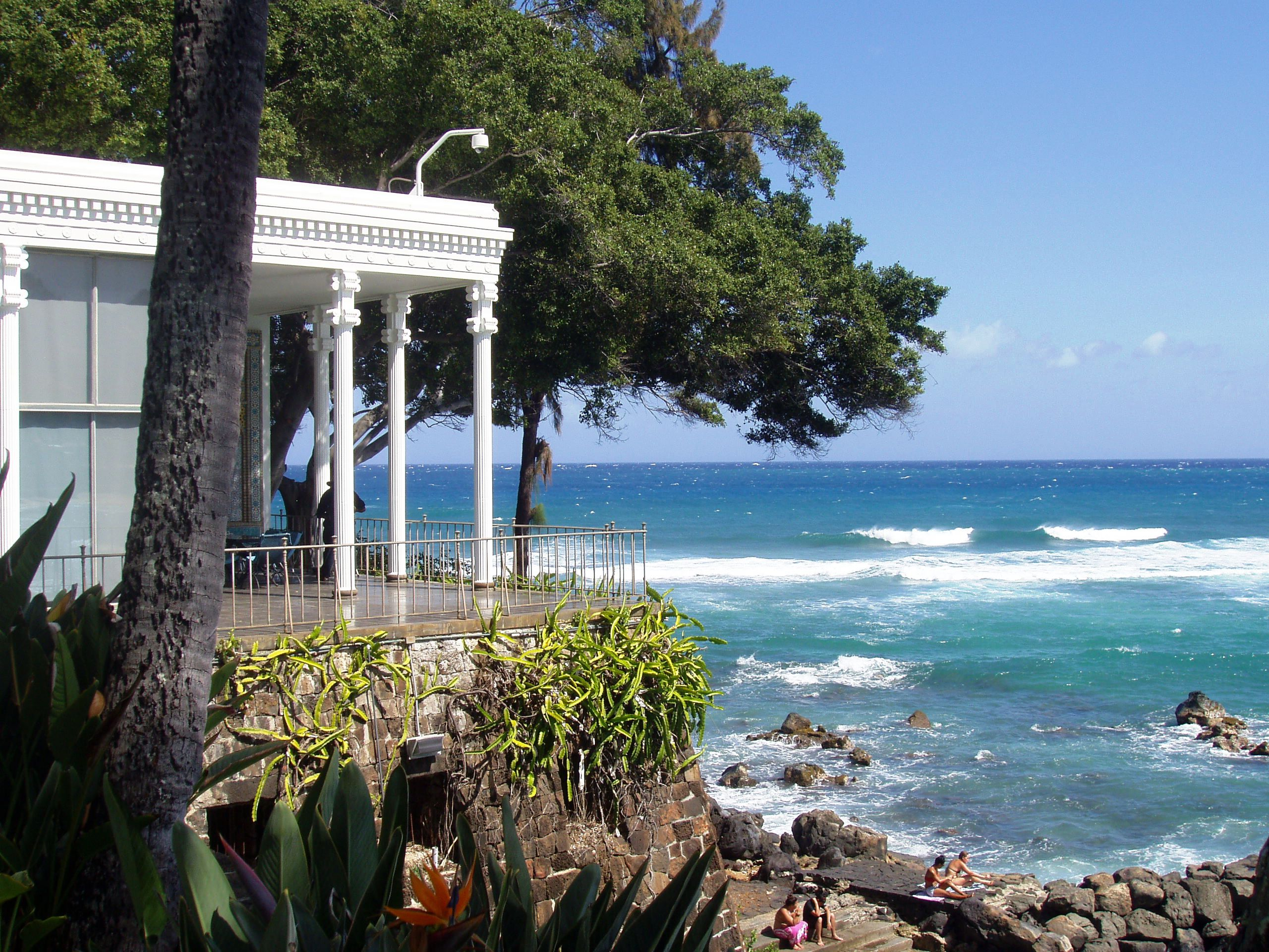 Shangri La (Doris Duke estate), outside Honolulu, Hawaii - sea view.